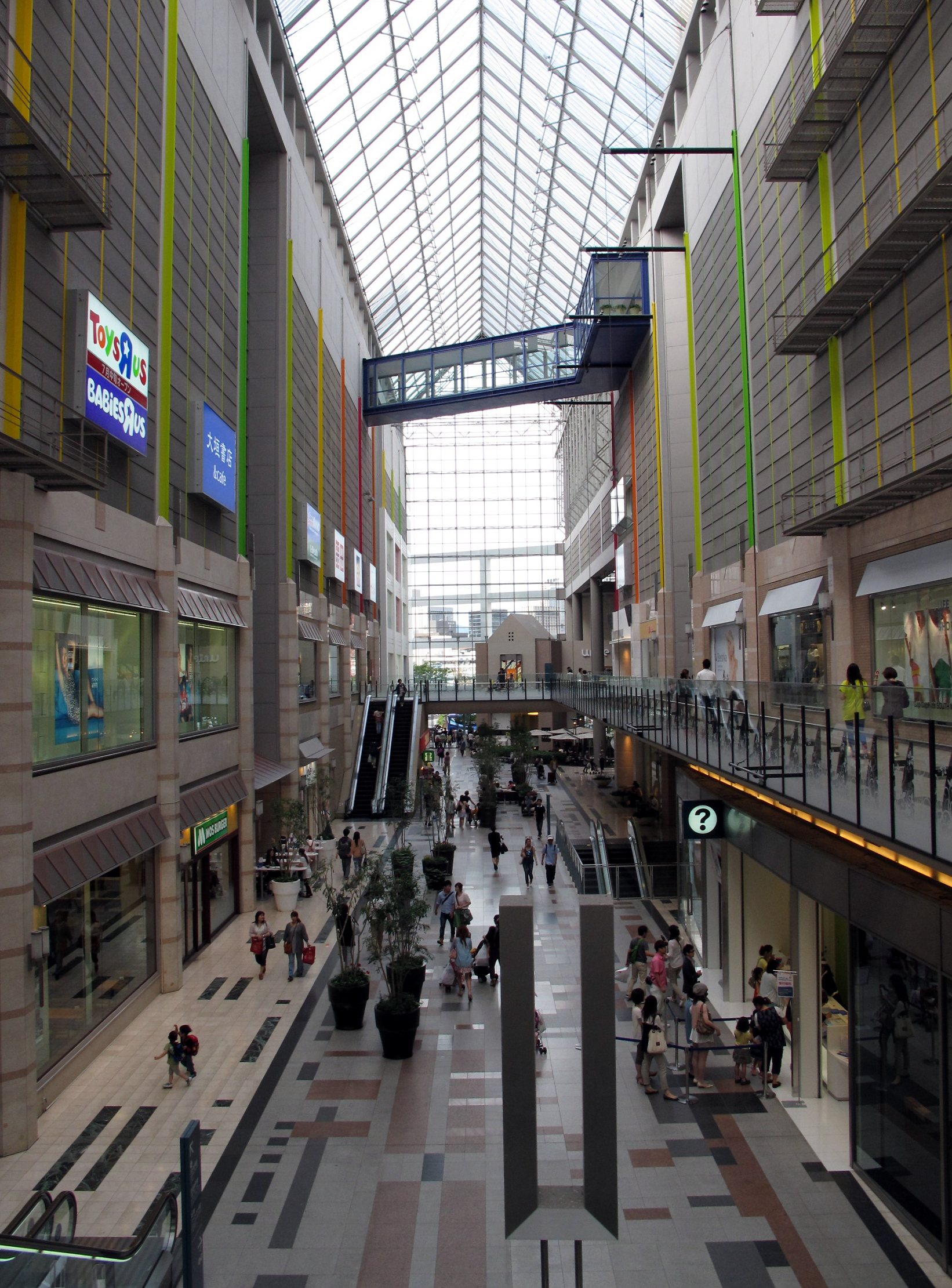 umie Main Void